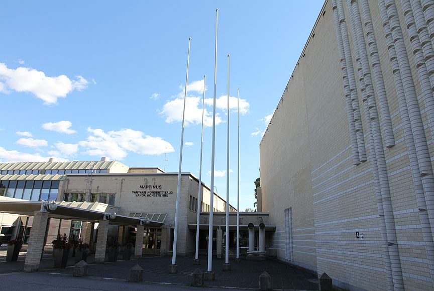 Konserttitalo Martinus Vantaan Martinlaaksossa. Saman rakennuksen toisessa päädyssä sijaitsee Mercuria kauppaoppilaitos ja Martinlaakson lukio. Huom: Muista säilyttää viittaus kuvaajaan, mikäli käytät kuvaa.